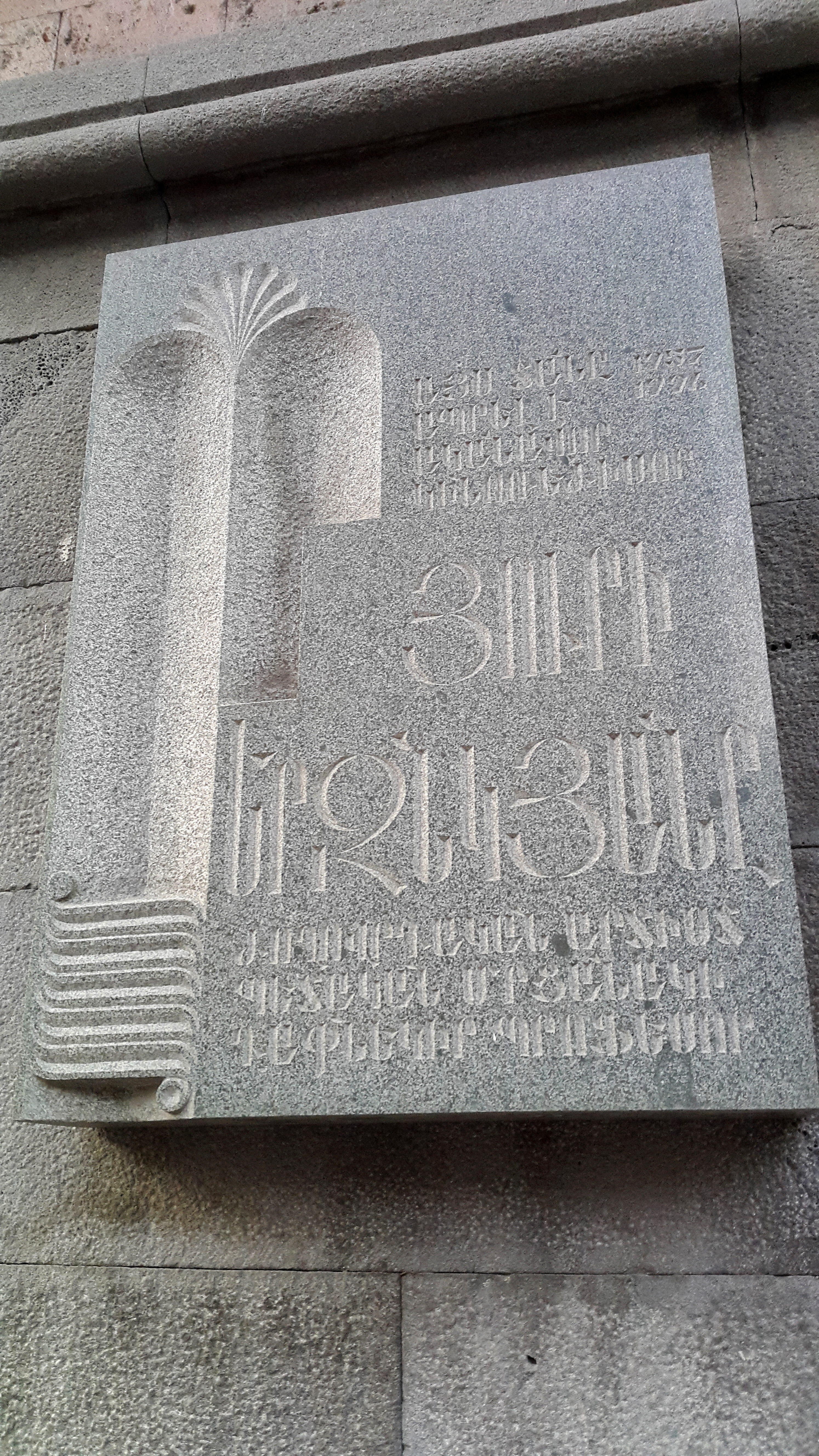 Յուրի Երզնկյանի հուշատախտակը